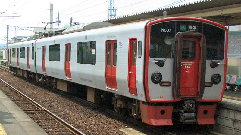 JR九州815系電車 JR Kyushu Type 815 EMUs (JR九州815系電車) EMU Design: Eiji Mizuoka Place: Musashizuka Station 車両デザイン : 水戸岡鋭治 撮影場所 : 光の森駅 撮影者/著者/著作権保有者 : MK Products (本人がアップロード) 撮影日 : 2007/03/02 JR九州815系電車用にアップロードした画像です。良い画像があれば別の画像に変えてください。